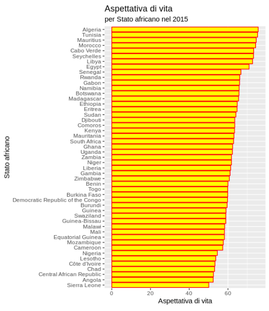 file realizzato con RStudio con dati dal WHO